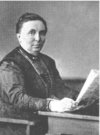 Ytsje Kooistra, pedagoge uit Drachten